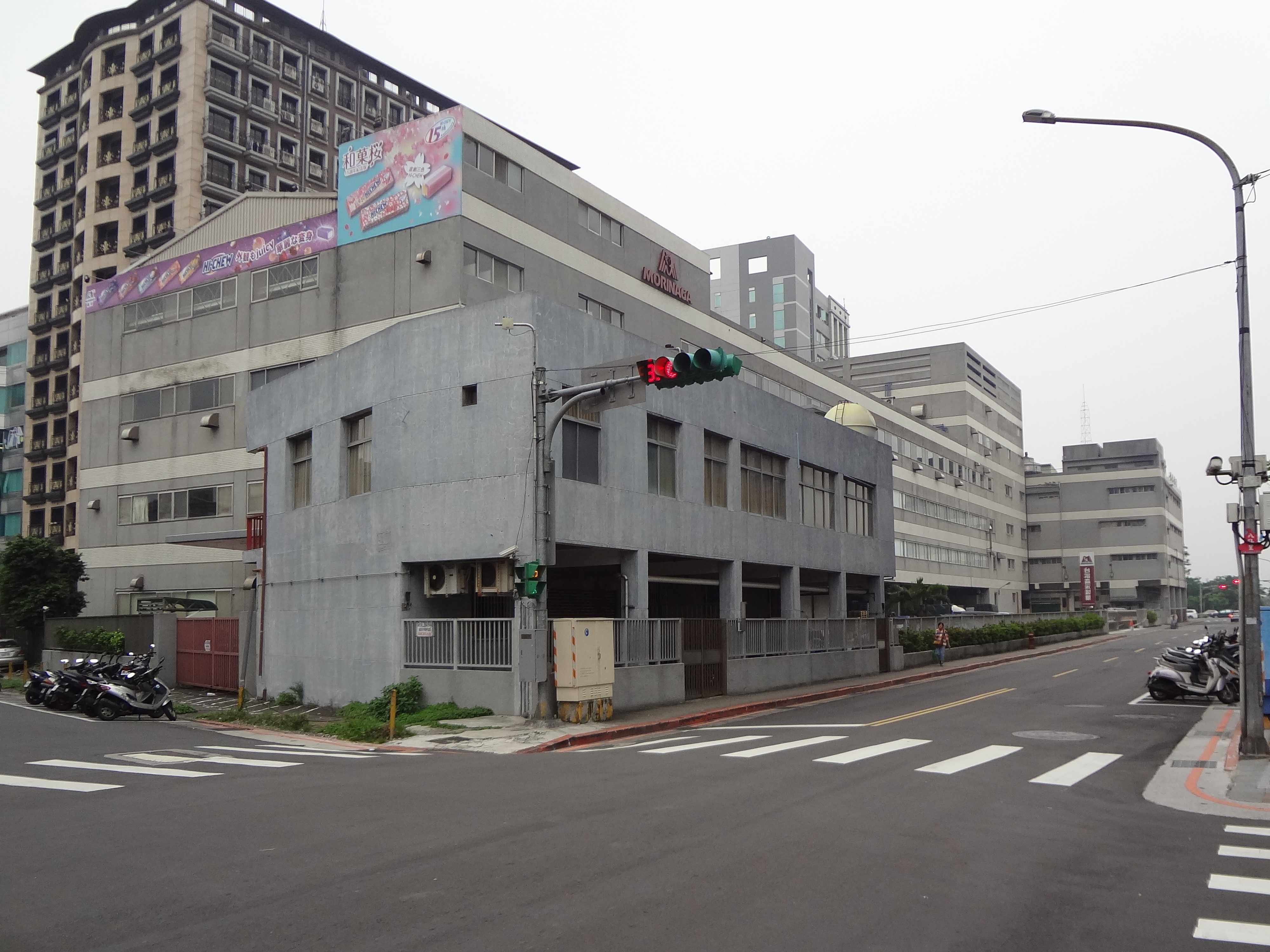 台灣森永製菓總部，地址：臺北市北投區中央南路二段22號。